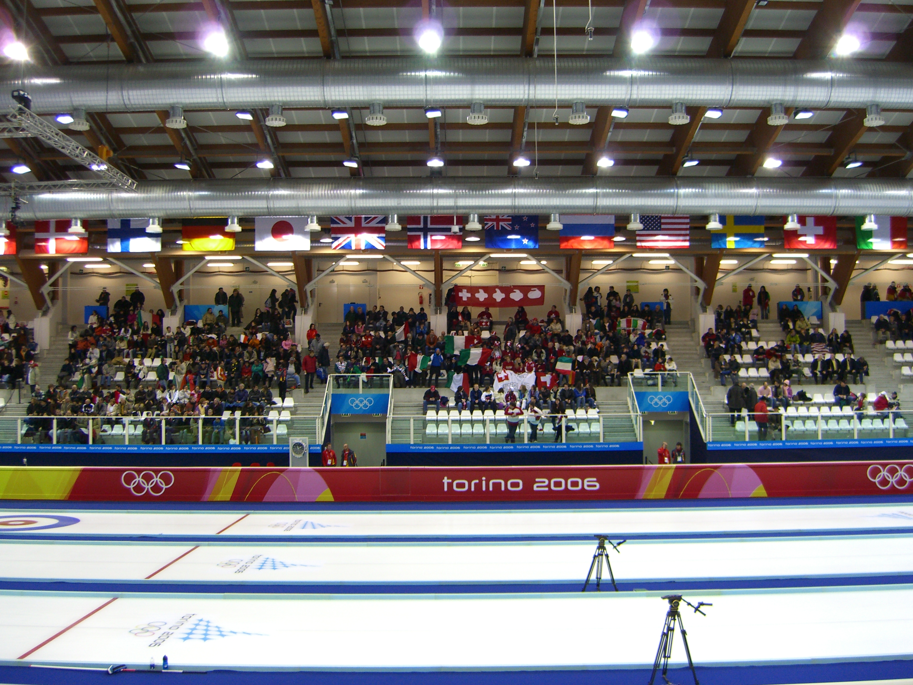 Curling delle olimpiadi invernali di Torino del 2006. Pinerolo, Palaghiaccio, interno.